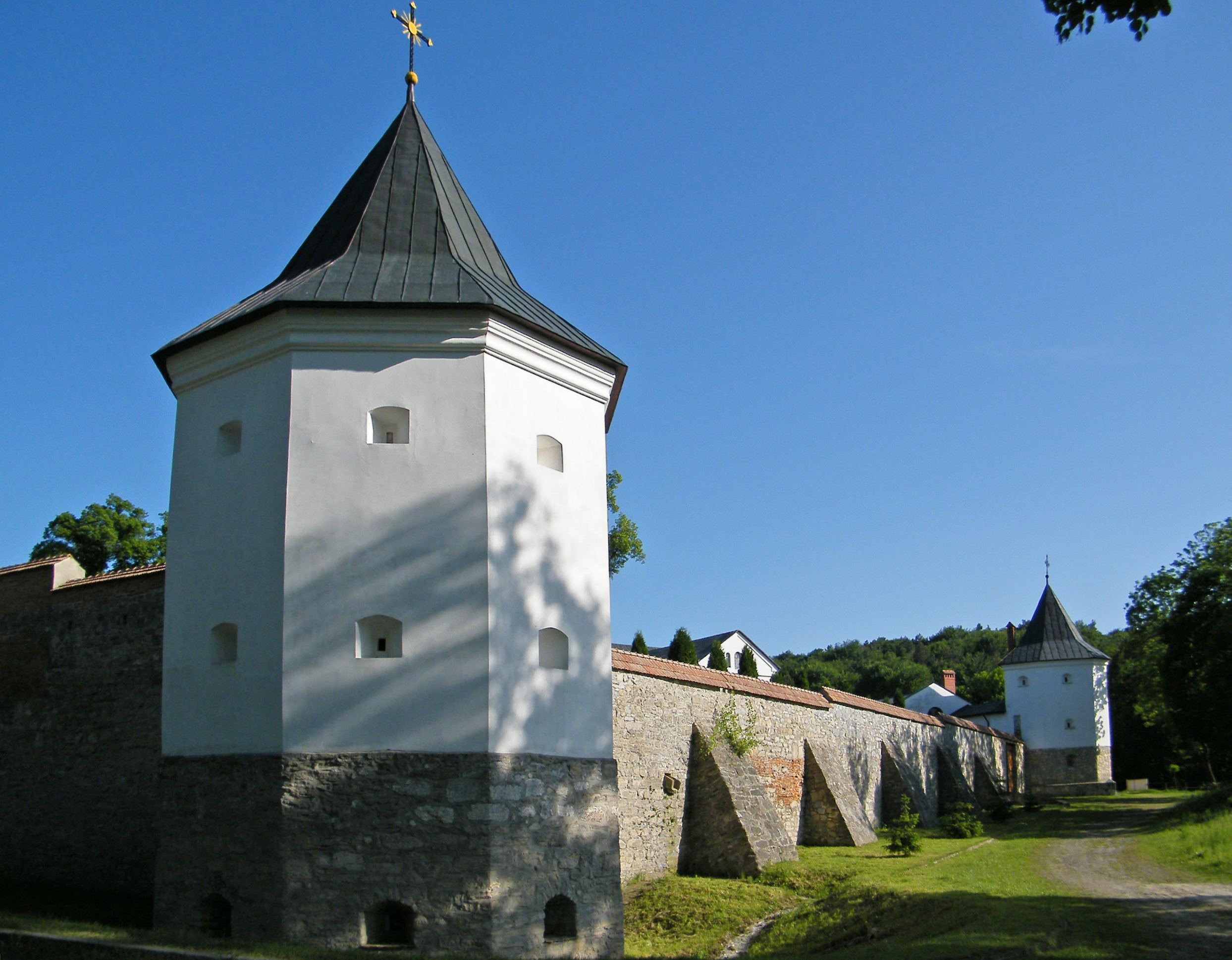 Вид на монастырь